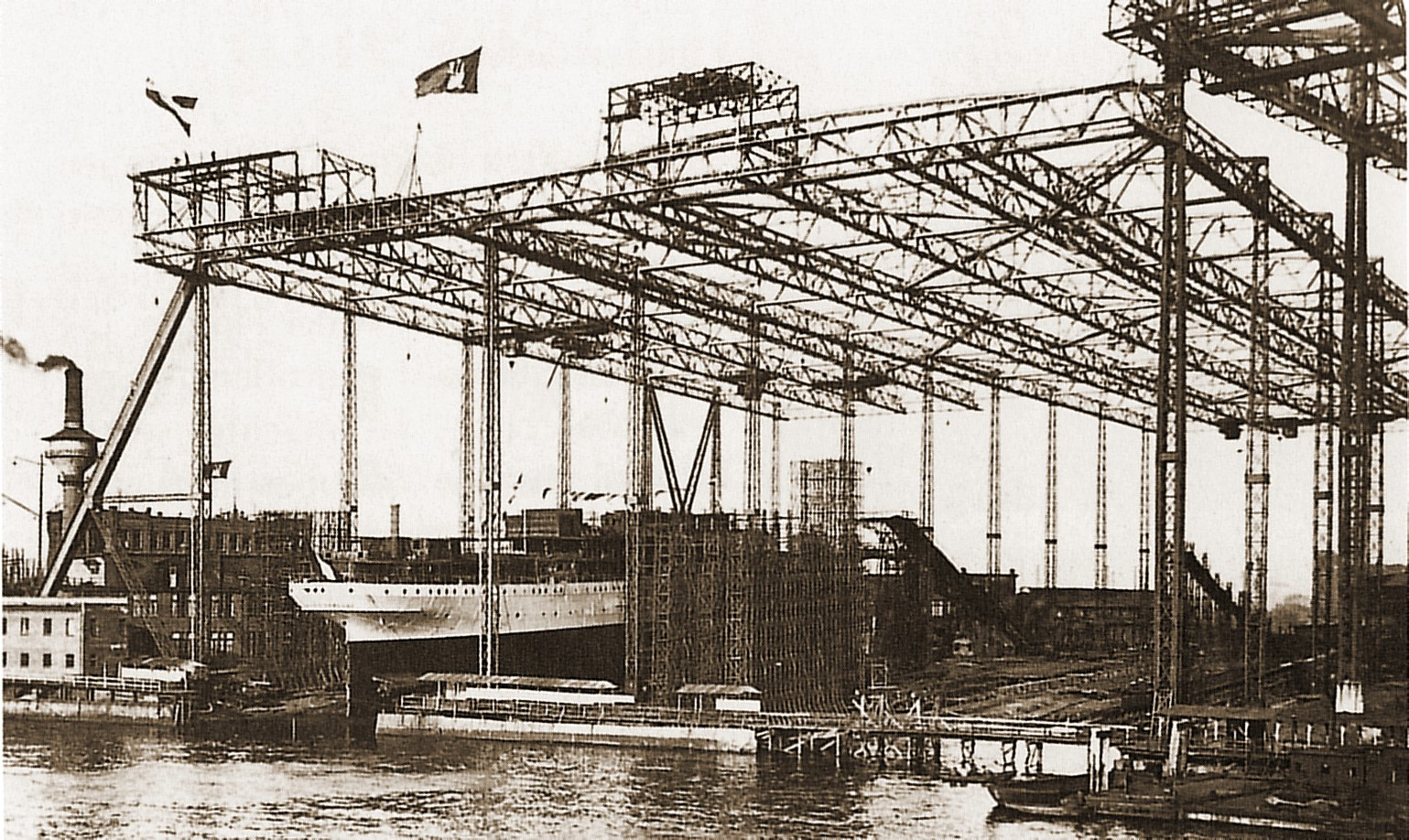 Helgen der Hamburger Werft Blohm & Voss, retuschiert von AxelHH